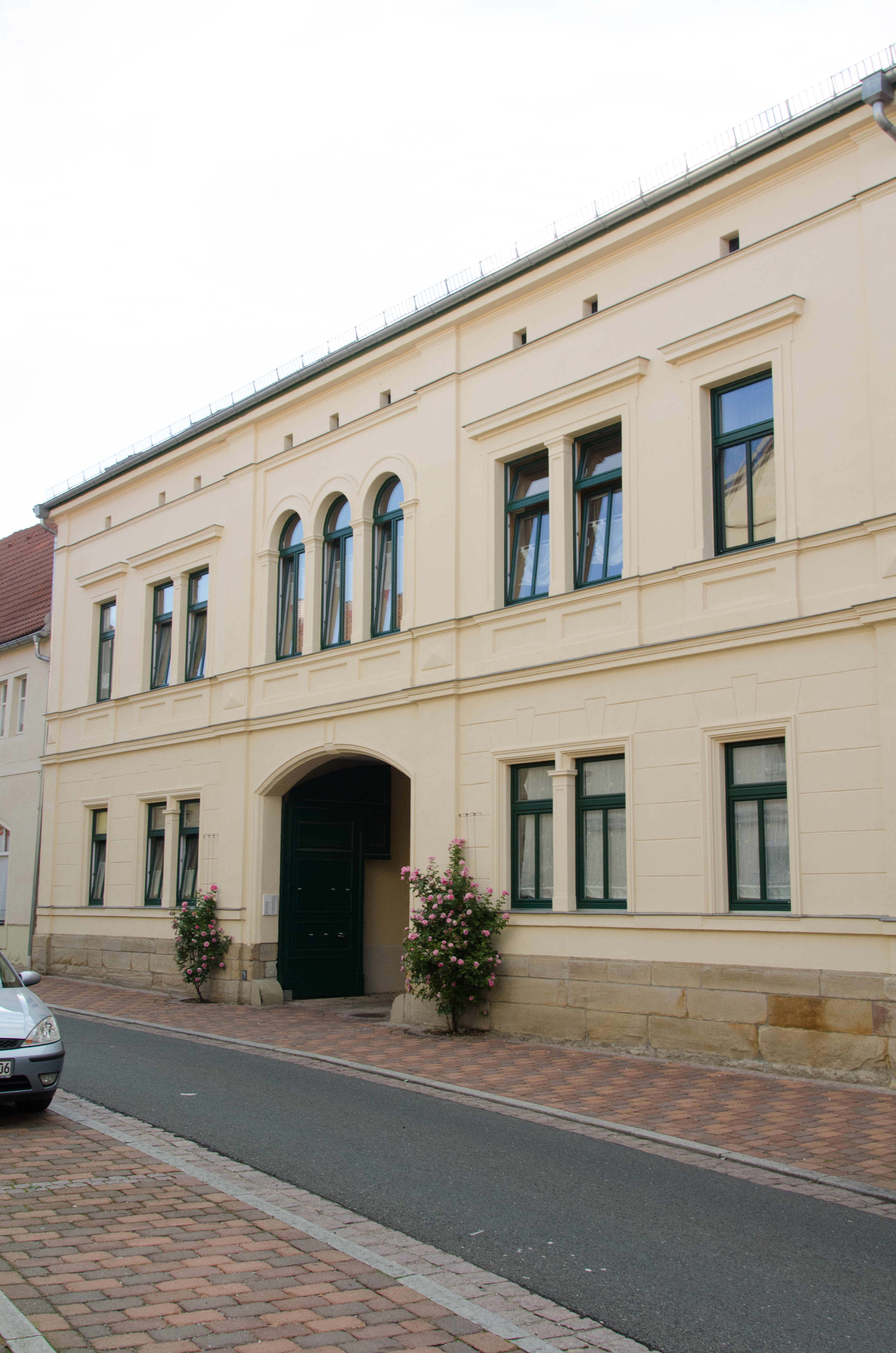 Querfurt, Lederberg 12, 14